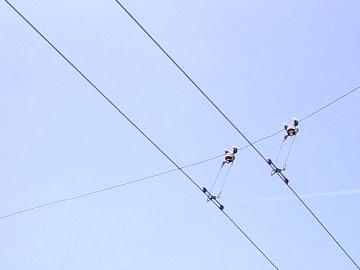 trolleybovenleiding in Arnhem, eigen foto